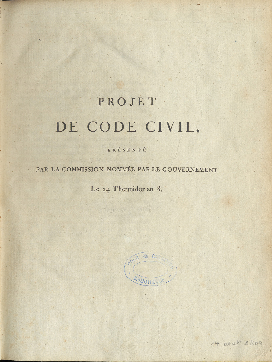 Projet de Code civil présenté par la Commission nommée par le Gouvernement, le 24 Thermidor an 8